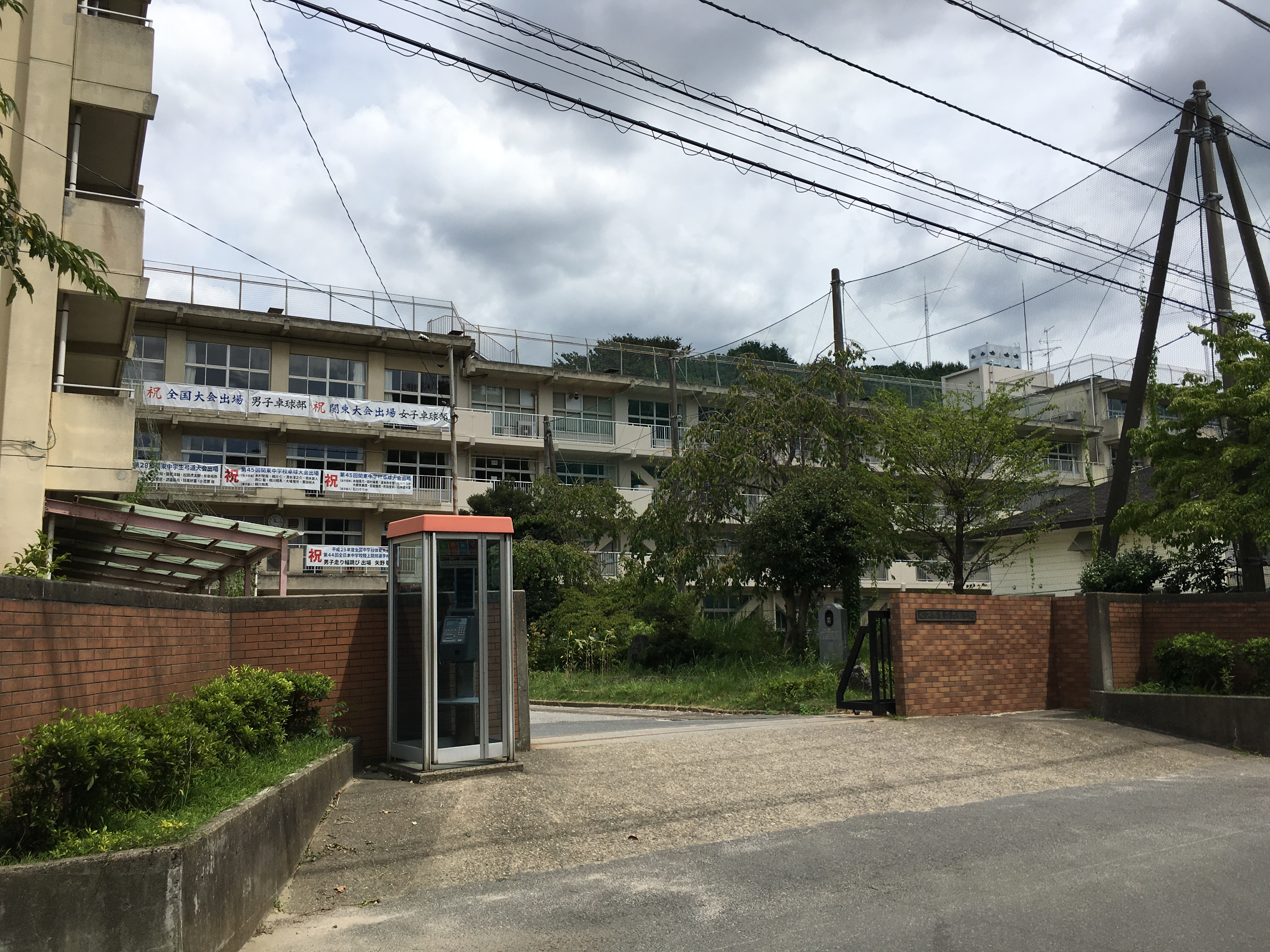 松戸市立第六中学校